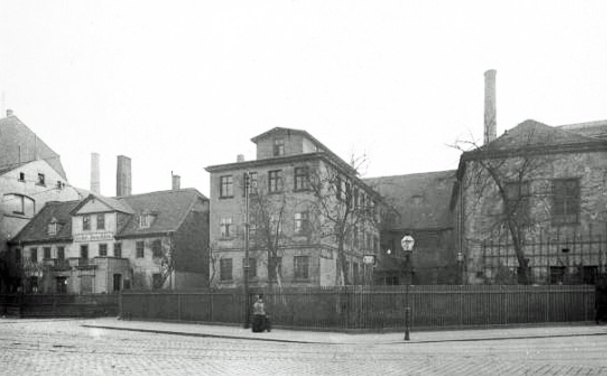 Verlagsbuchhandlung und Druckerei Albert Henry Payne an der Kohlgartenstraße in Leipzig, Mitte: ehem. Gotisches Haus des Kuchengartens